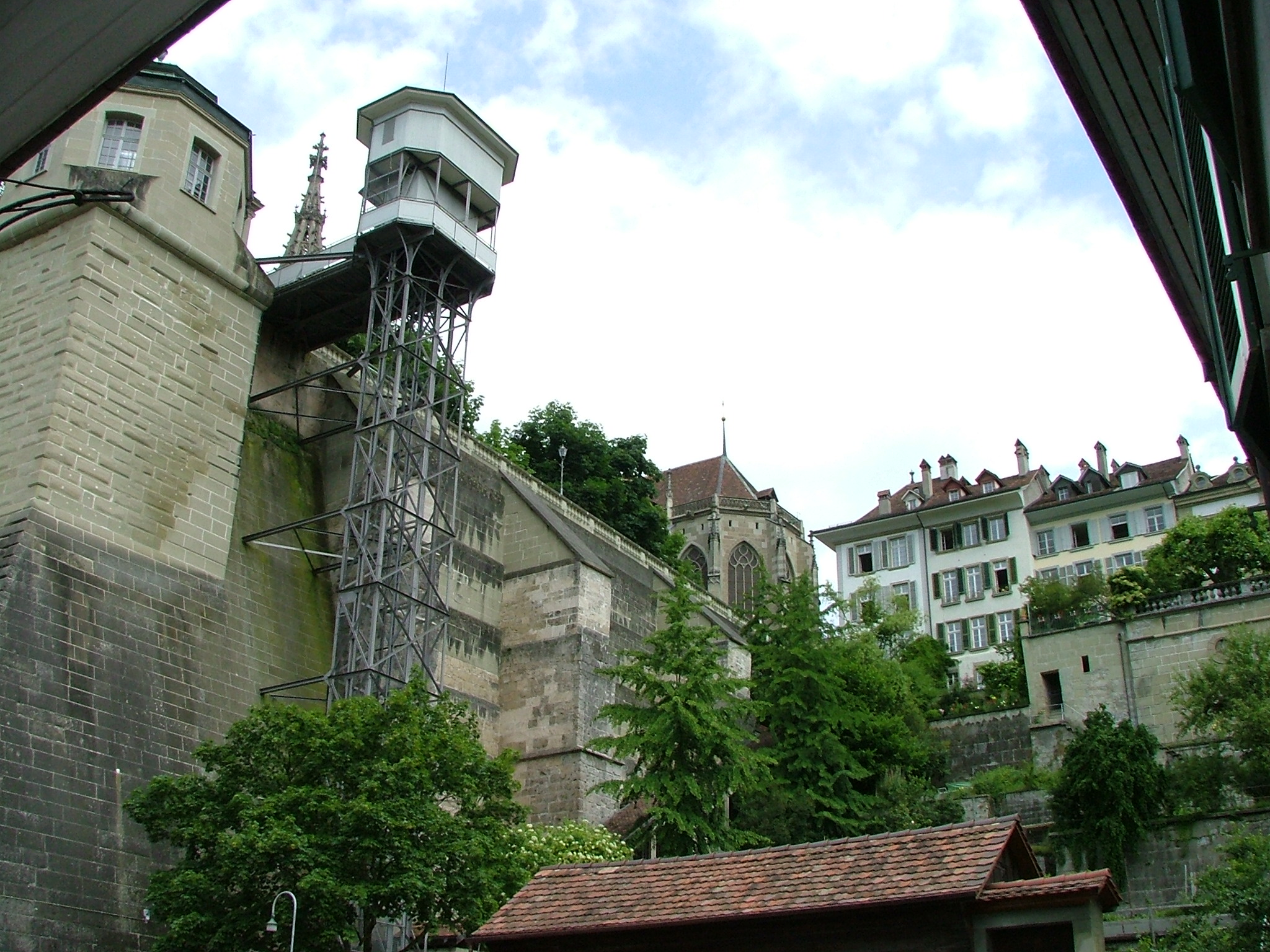 Senkeltram (winda) w Bernie w 2006r.